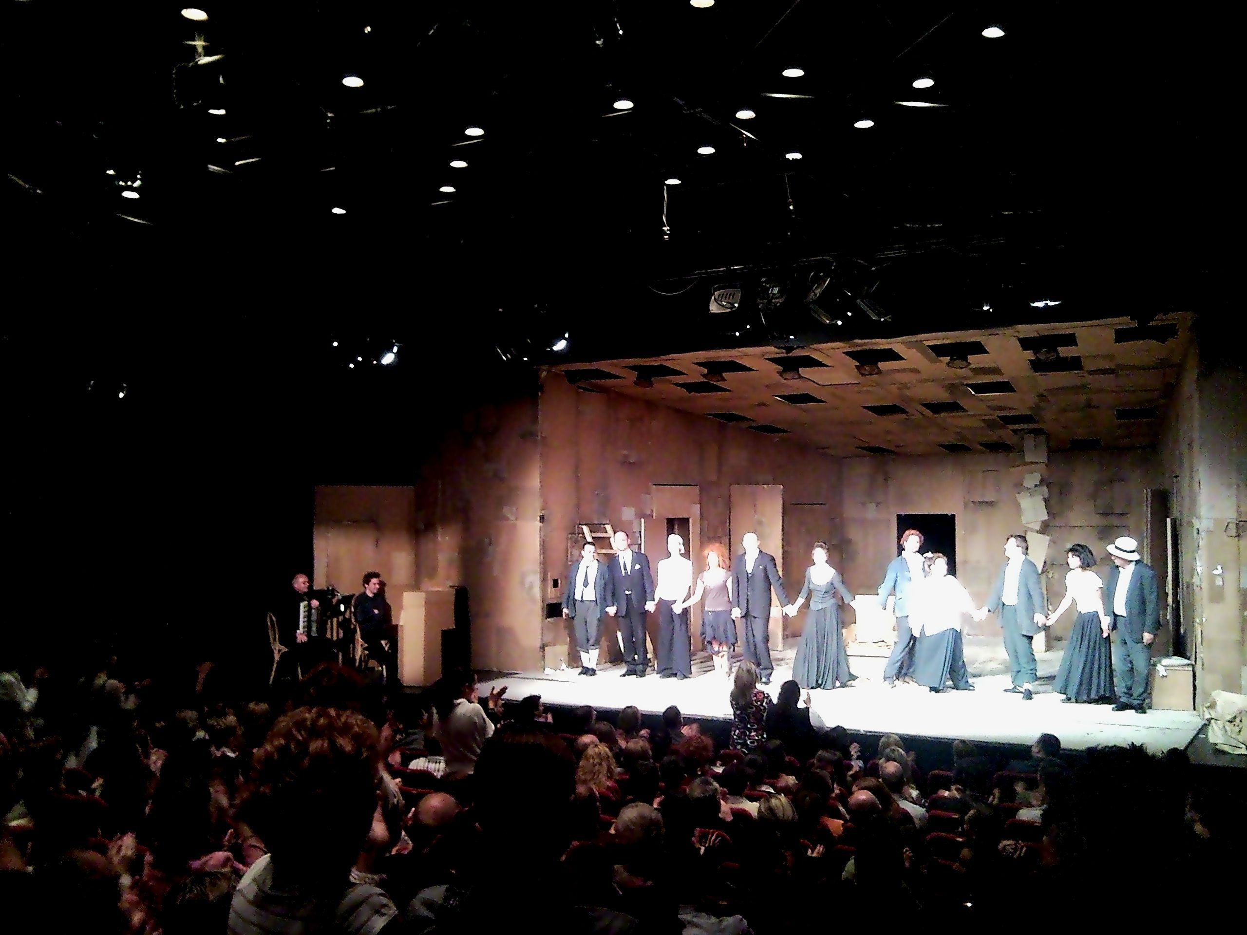 Katona József Színház (Budapest): A talizmán c. darab utolsó, 150. előadásának tapsrendje